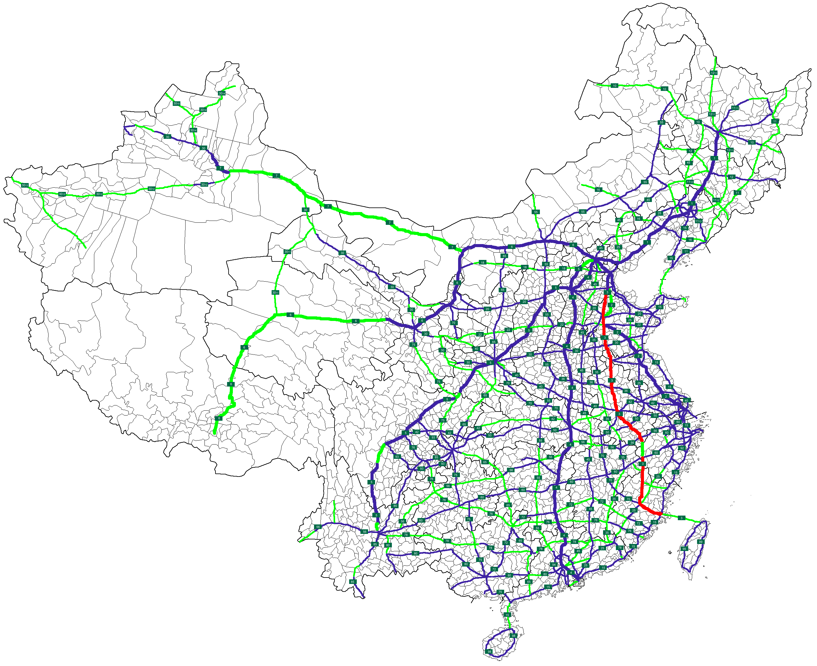 Source file(Map of NTHS Expressways of China.png) was uploaded ASDFGH at en.wikipedia. Later version(s) were uploaded by Nima Farid at en.wikipedia. Modification for NTHS Expressway G3 is my own work.